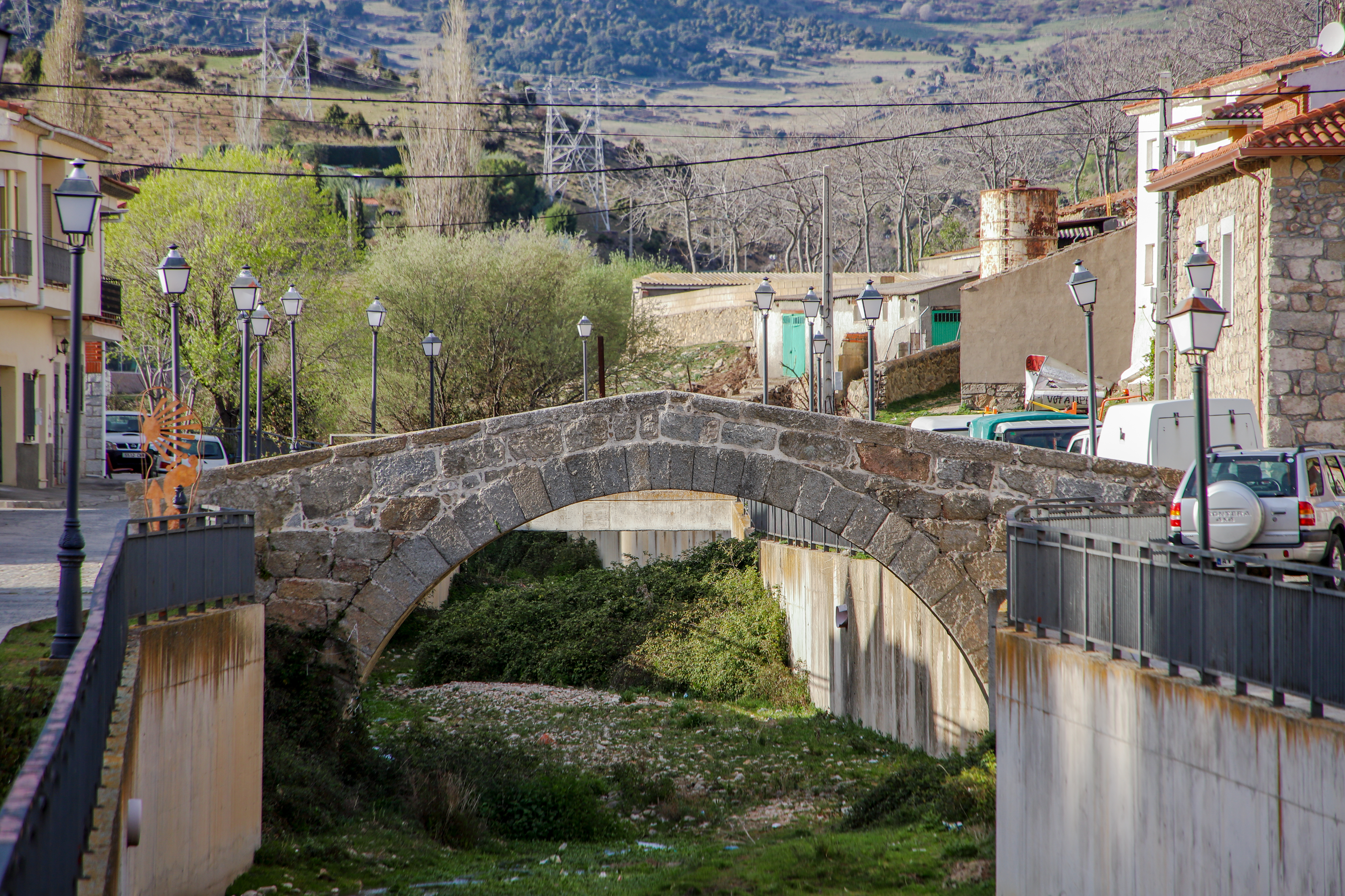 Herradón de Pinares es un municipio de la comarca de Ávila, en la provincia de Ávila.